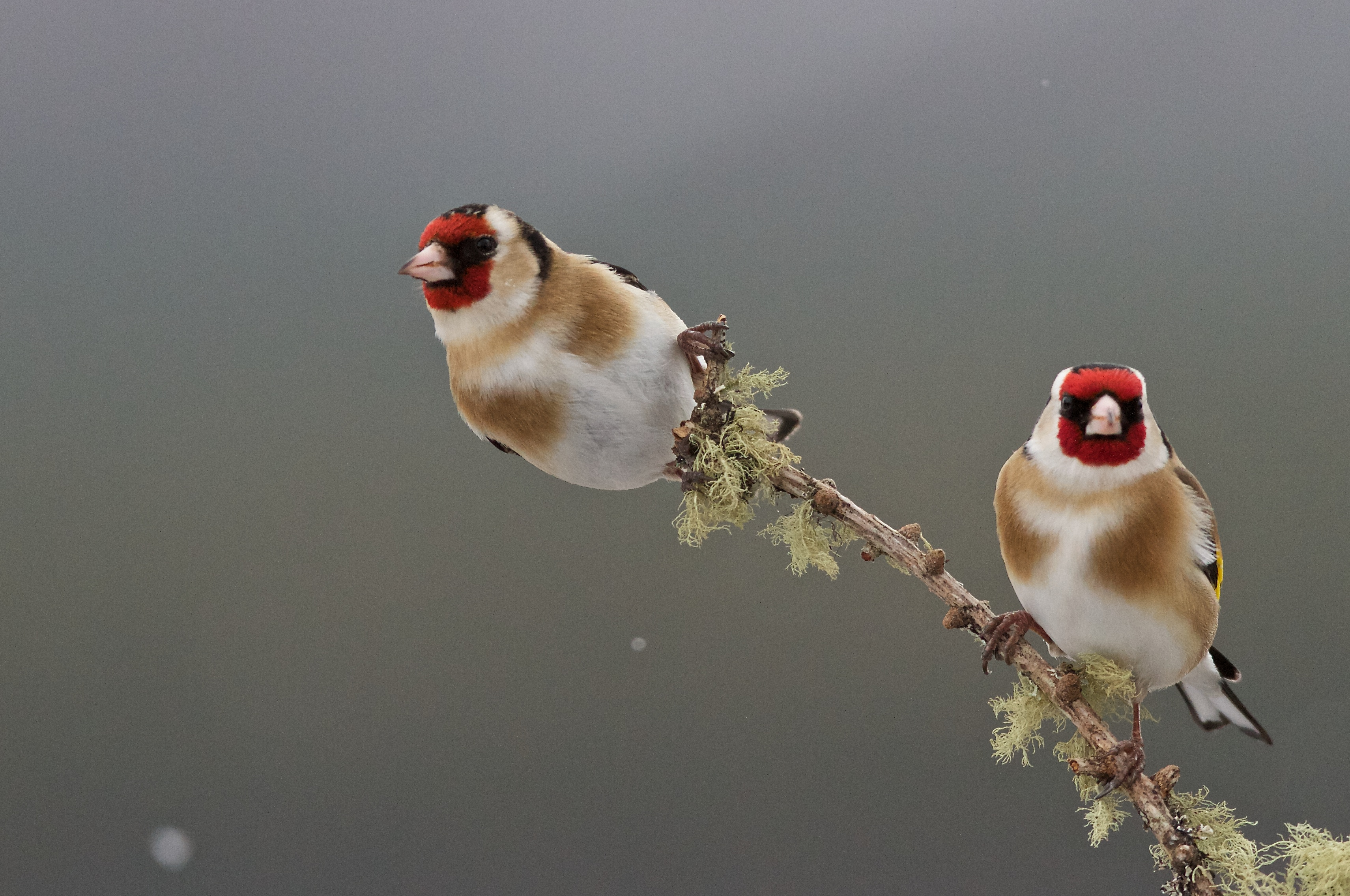 Glenfeshie